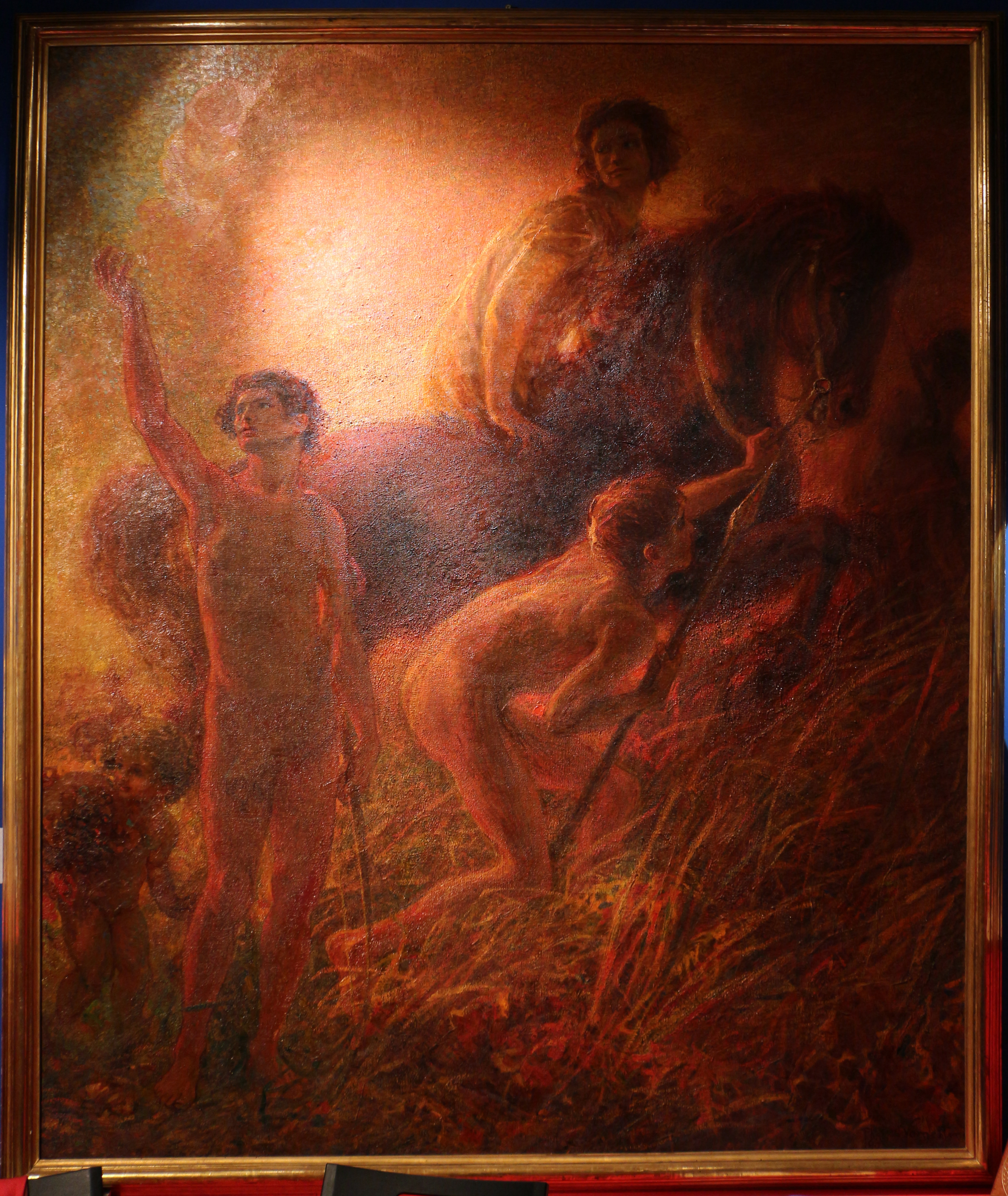 Giovinezza vittoriosatitle QS:P1476,it:"Giovinezza vittoriosa" label QS:Lit,"Giovinezza vittoriosa"